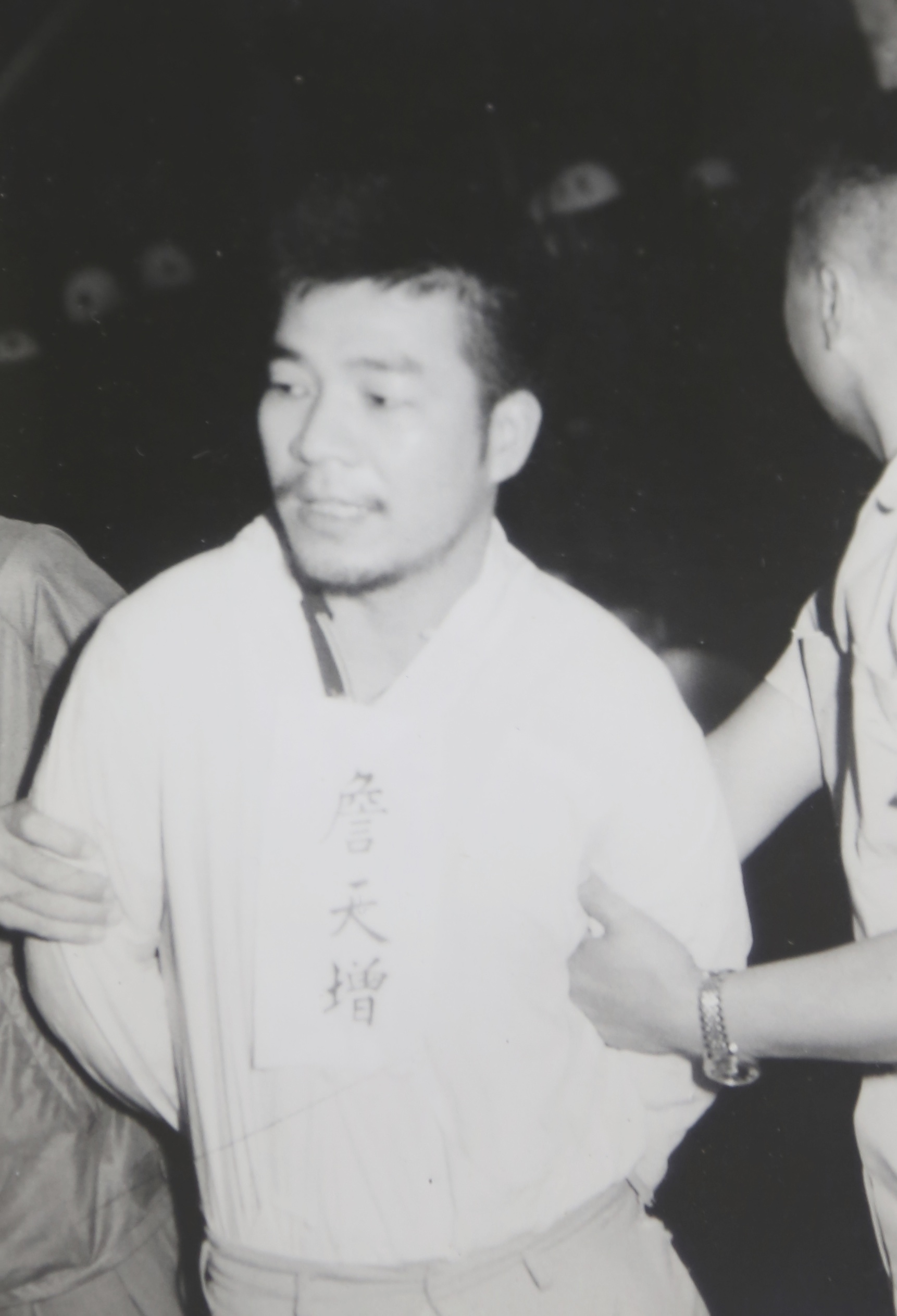 中文（台灣）: 詹天增遭槍決前照片